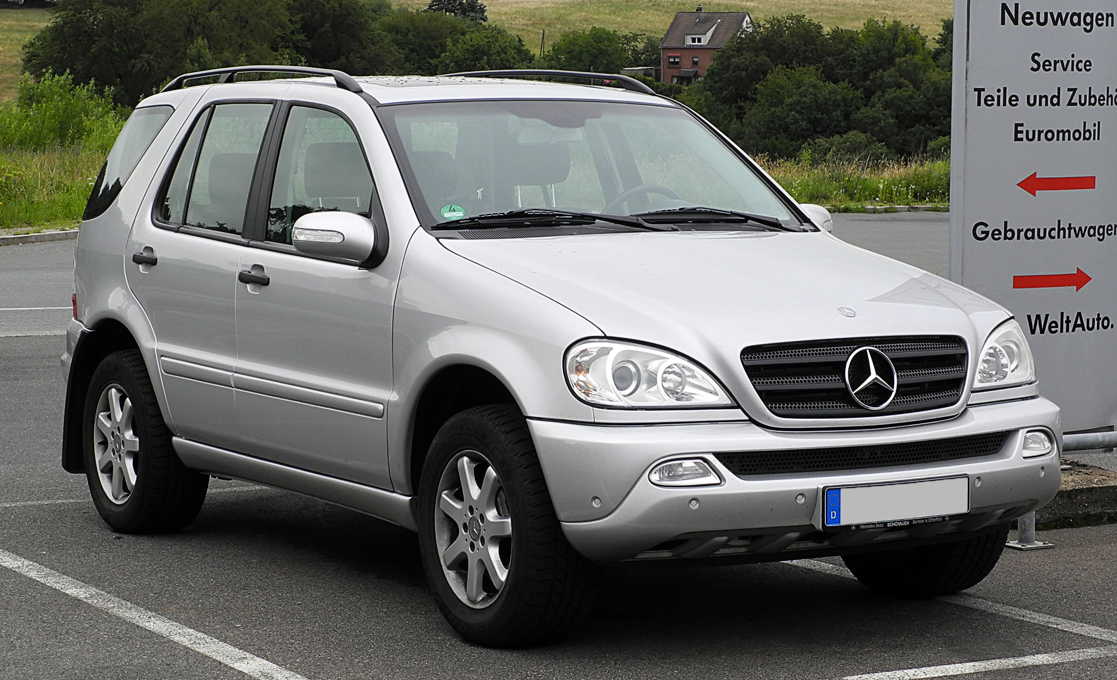 Mercedes-Benz ML 270 CDI (W 163, Facelift)